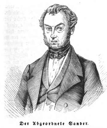 Georg Adolf Sander, 1844, Abgeordneter des badischen Landtages.